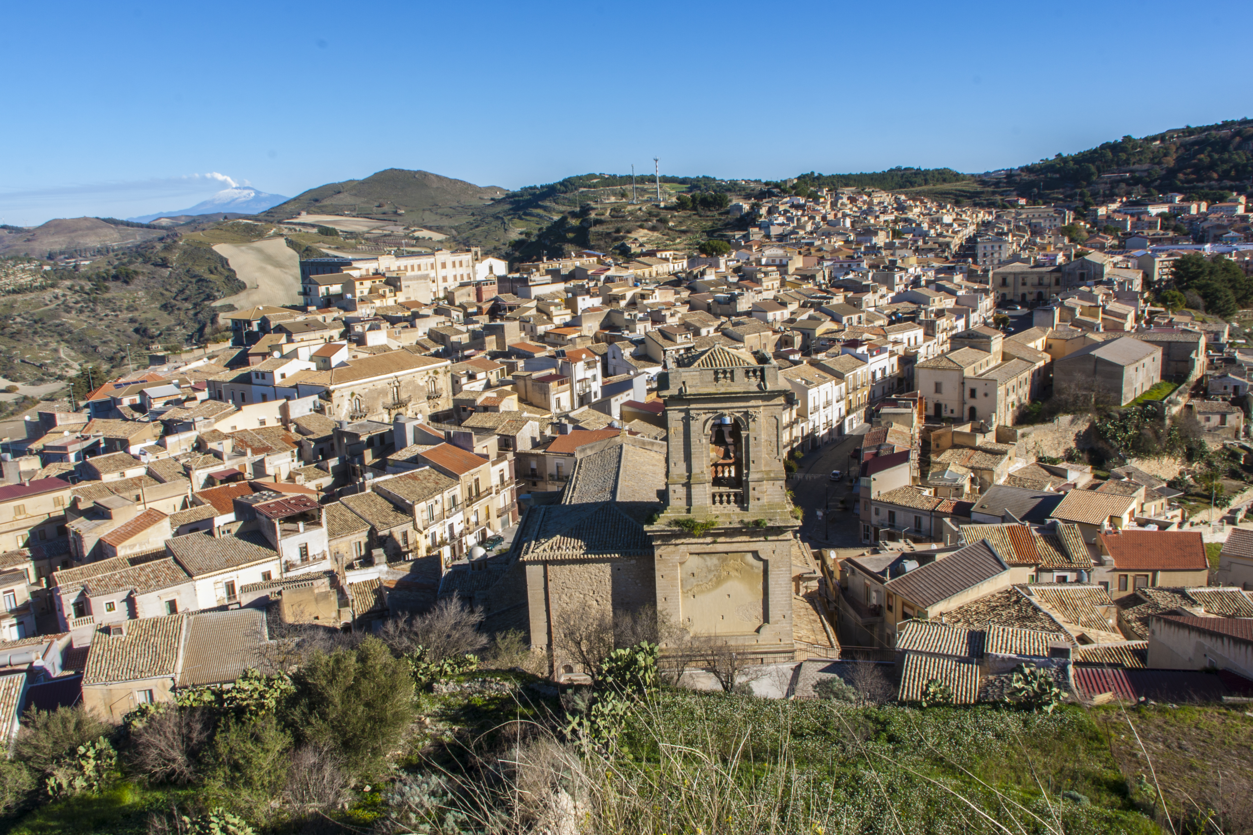 Licodia Eubea dal Castello